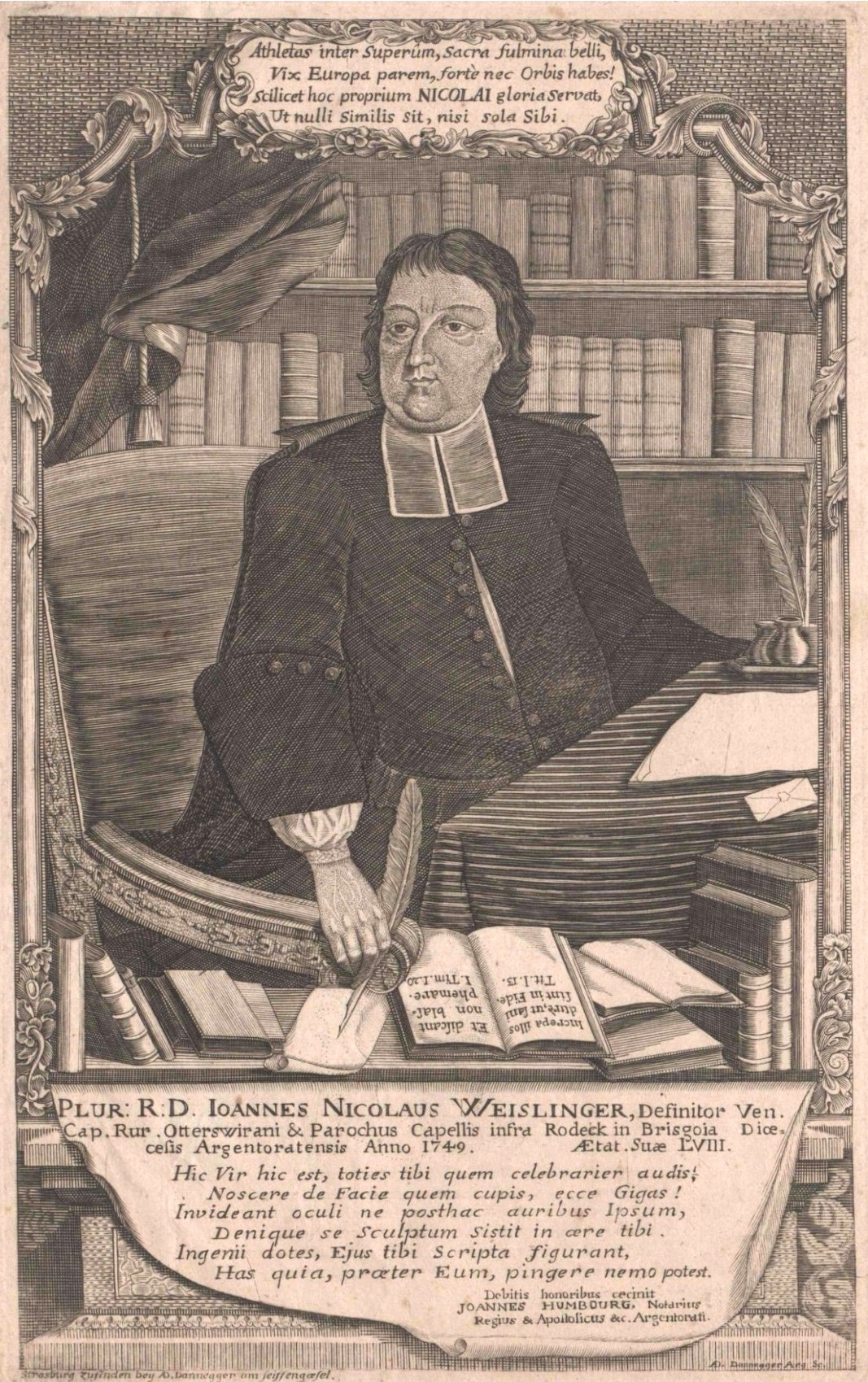 Johann Nikolaus Weislinger (1691-1755), Pfarrer in Kappelrodeck, Kontroverstheologe. Die lateinische Beschriftung rühmt ihn als "athleta" und "gigas" auf dem geistlichen Kampfplatz. Im aufgeschlagenen Buch zwei lateinische Bibelzitate: "Increpa illos dure, ut sani sint in fide" (Titus 1:13) "Et discant non blasphemare" (1 Tim 1:20).